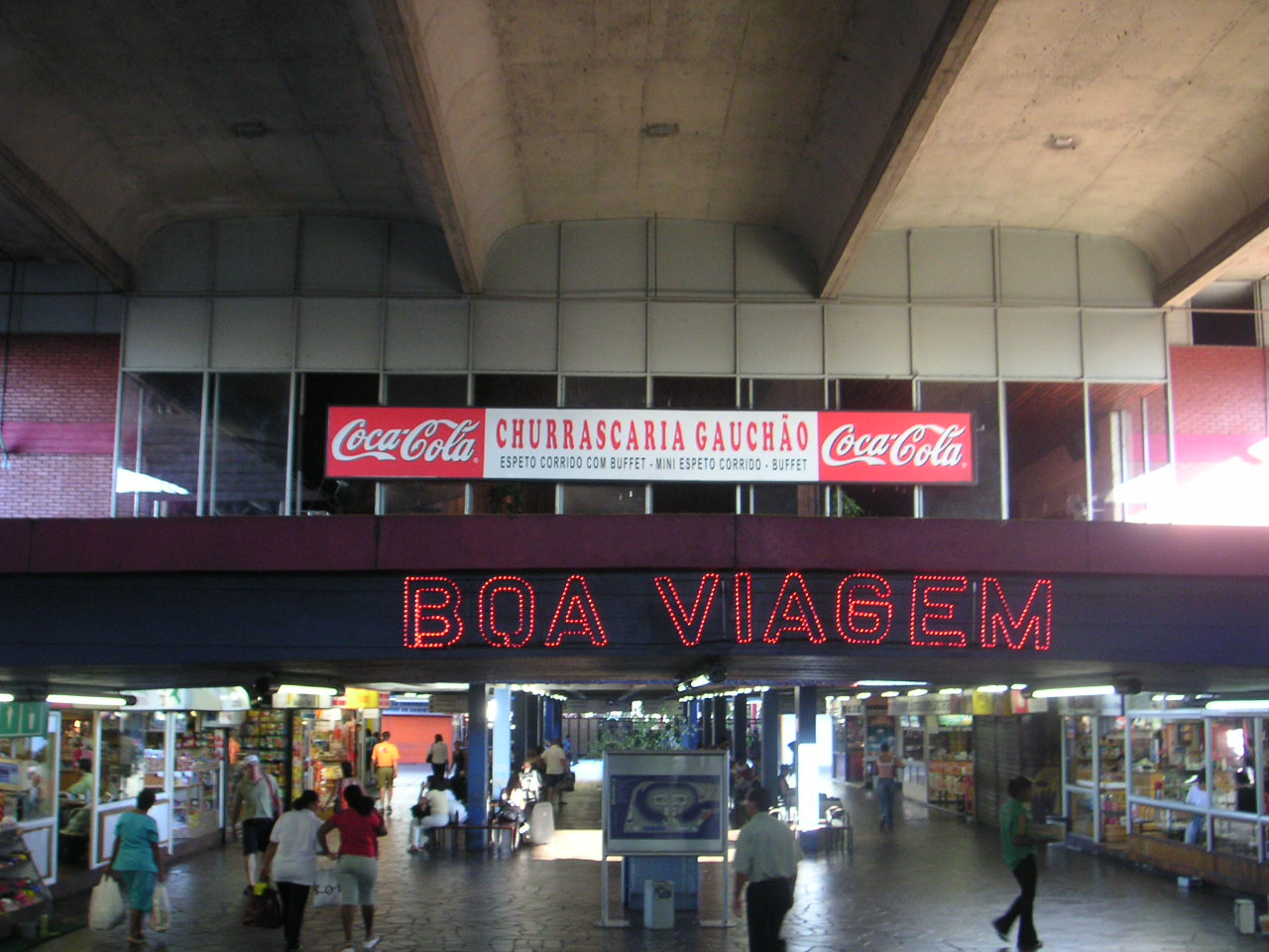 Rodoviária de Porto Alegre